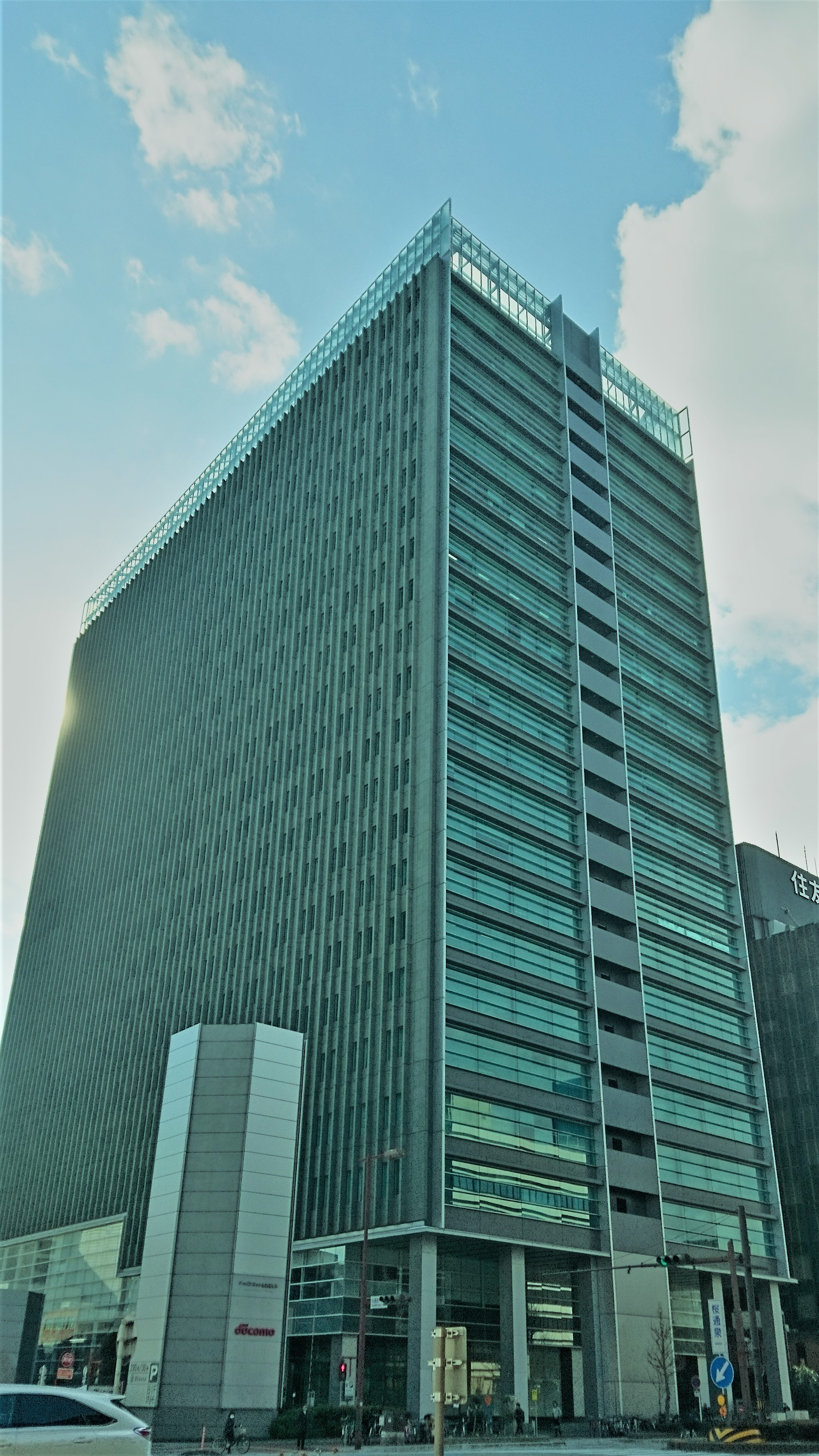 株式会社ドコモCS東海の本社がある「アーバンネット名古屋ビル」